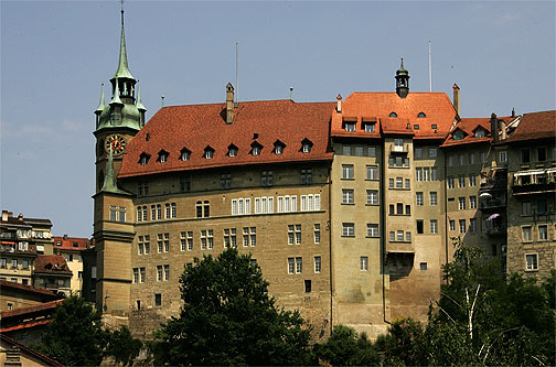 Fribourg / Freiburg: Rathaus